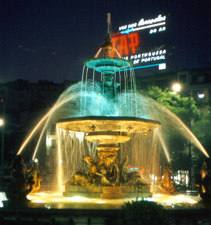 Rossio at Night